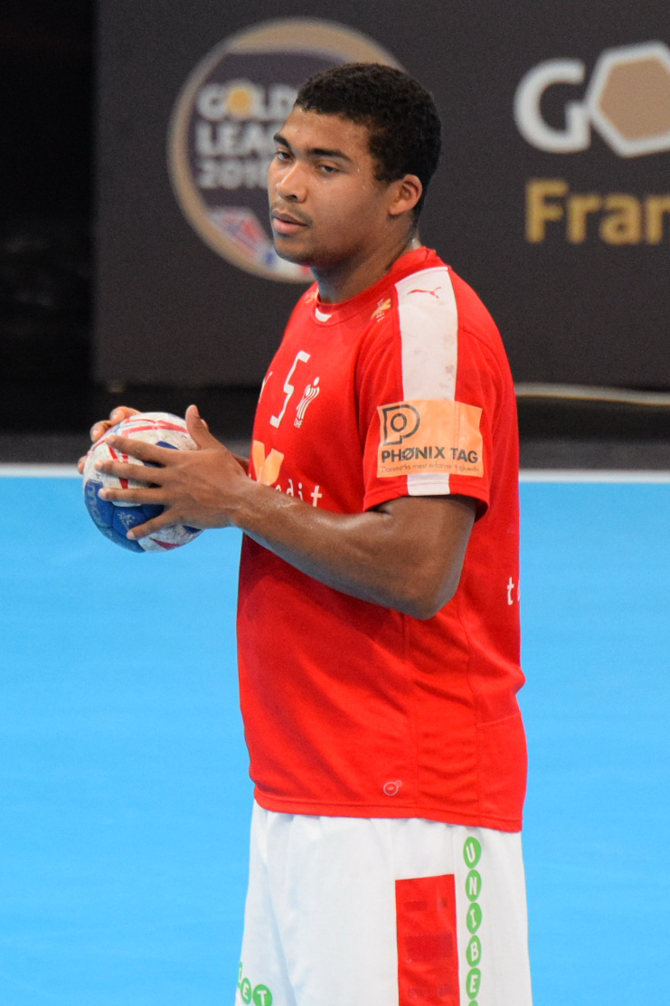 Le 10 janvier 2016 lors du match France / Danemark durant la Golden League à l'AccorHotels Arena (Paris).